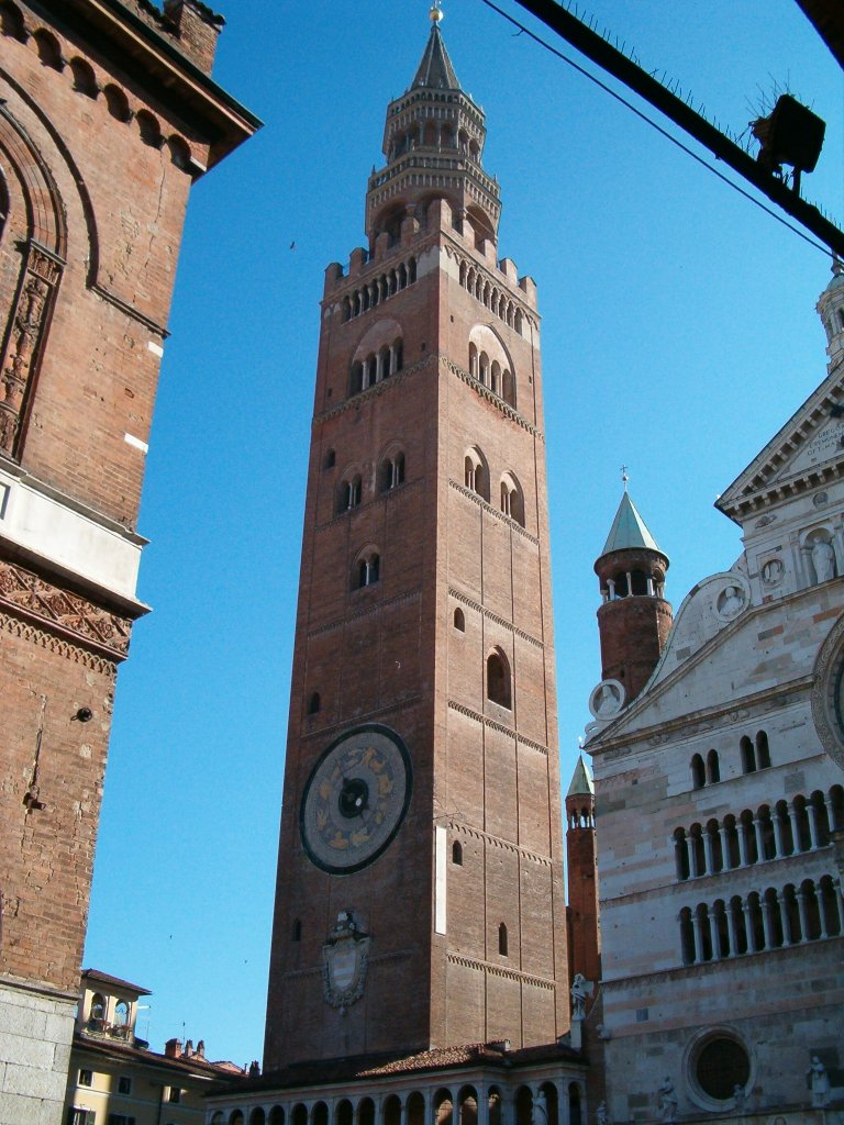 Cremona, Lombardia, Italia